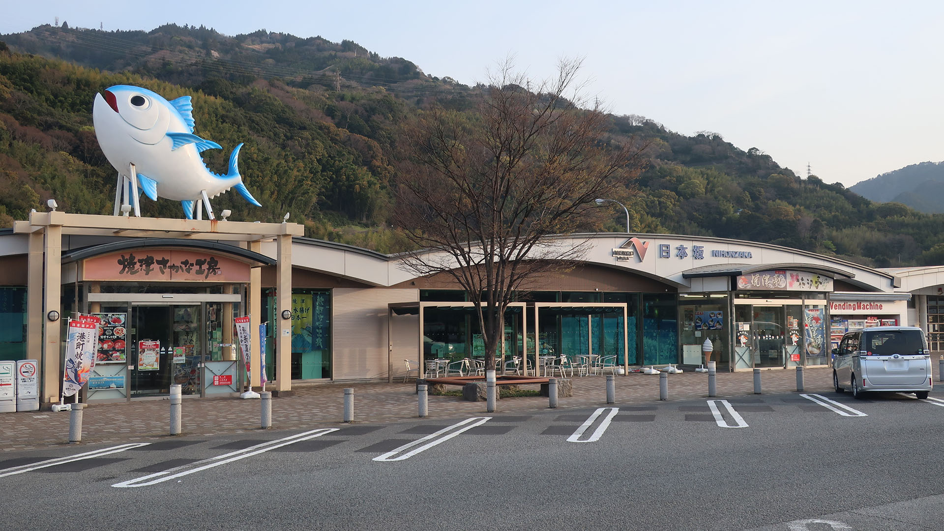 東名高速道路 日本坂PA